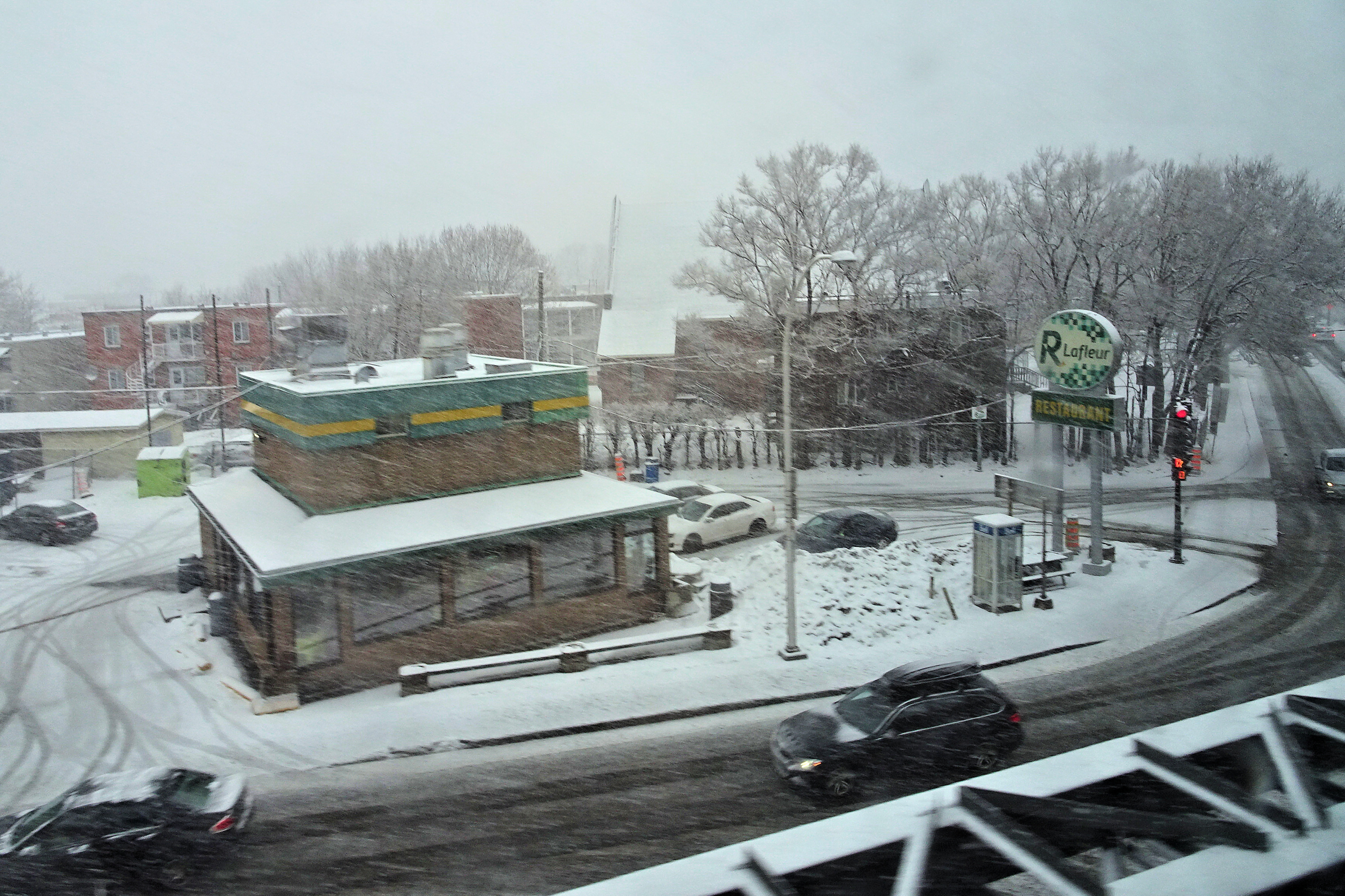 Saint-Pierre, Montreal, Quebec, Canada